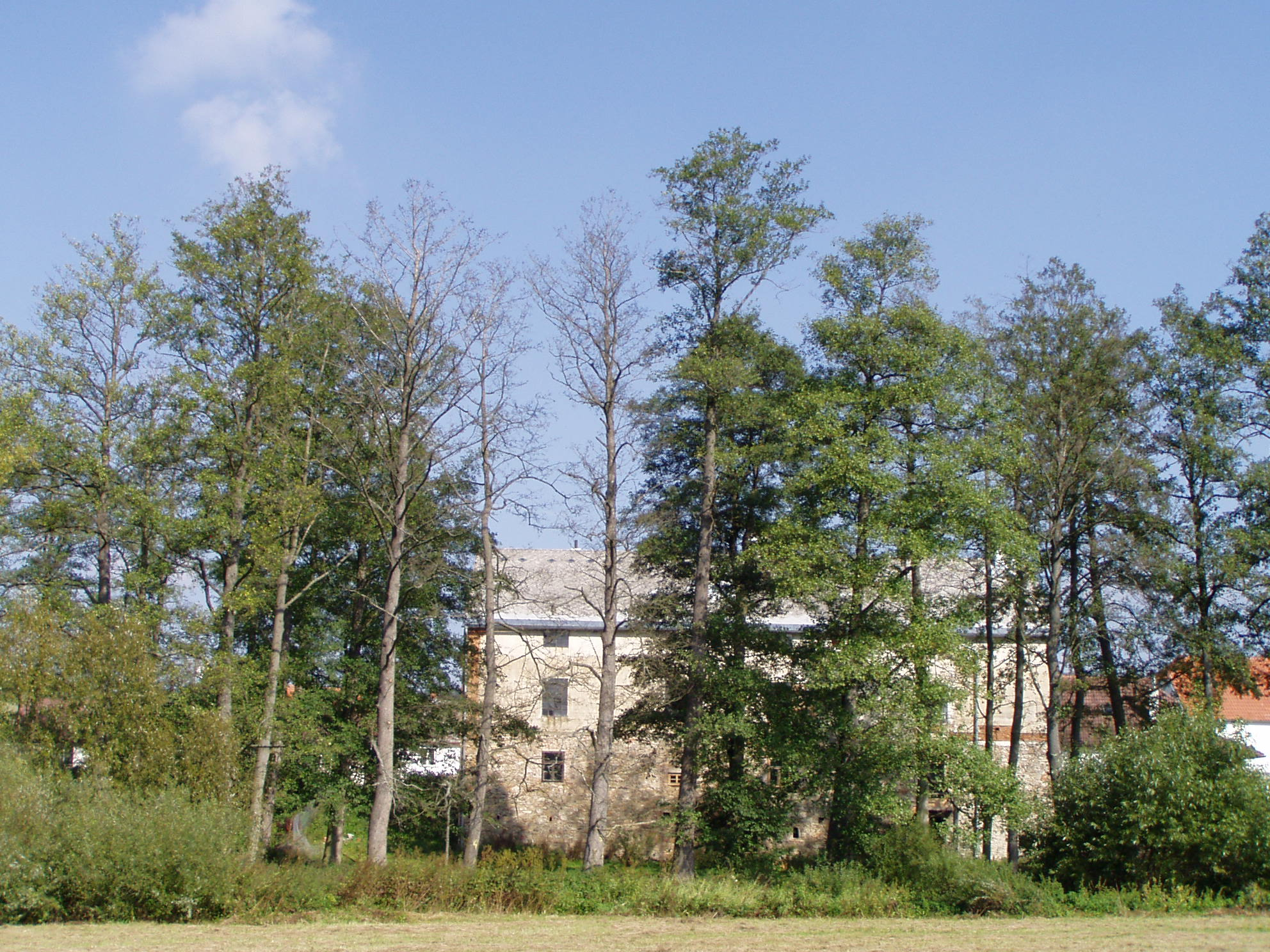 Black alder riparian stand affected by P. alni, Lomnice u Mirotic, Czech Republic, 2006